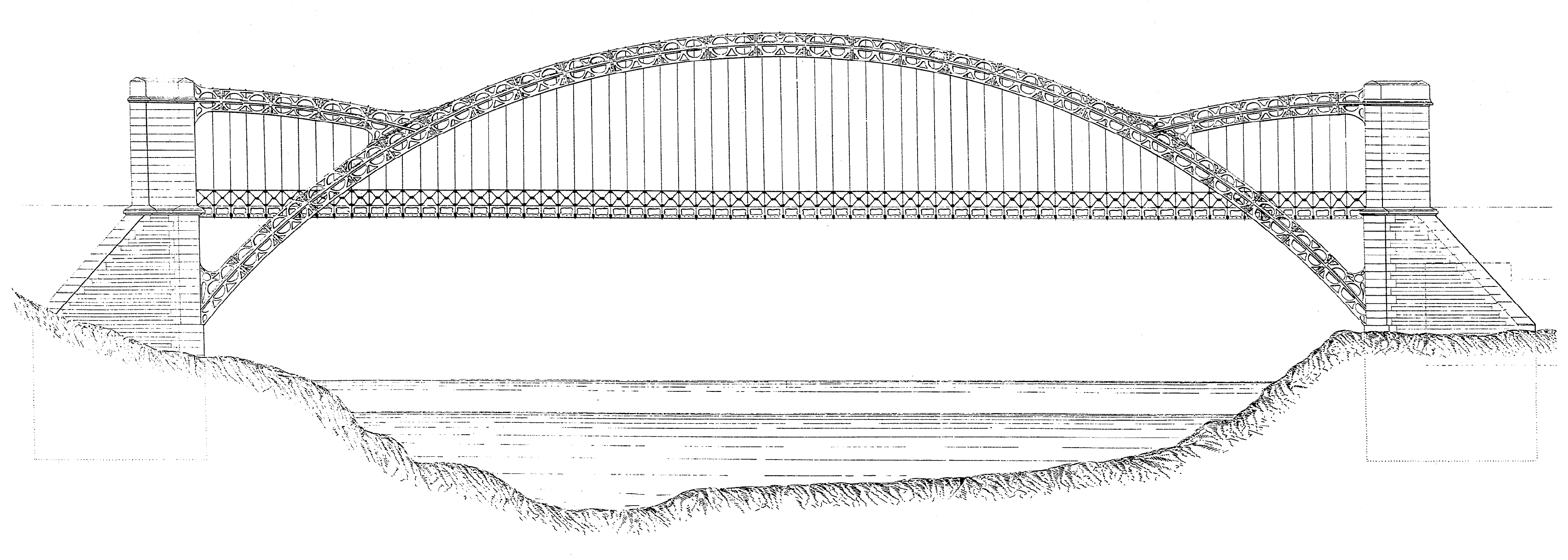 Planos del proyecto de "puente tipo Vergniais" sobre el Pisuerga en Valladolid (no llegó a ejecutarse, es el mismo emplazamiento donde hoy está el Puente Colgante), publicados por la Revista de Obras Públicas (vol. II, núm. 5) el 1 de marzo de 1854.